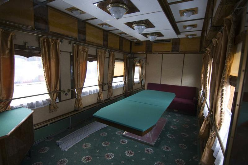 Вагон-салон № 70006 в експозиції Київської виставки рухомого складу історичних локомотивів та вагонів. Інтер'єр салону